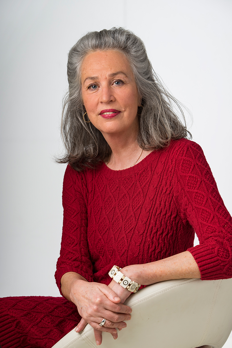 Gerry van der Linden, Photo by Patrick Siemons